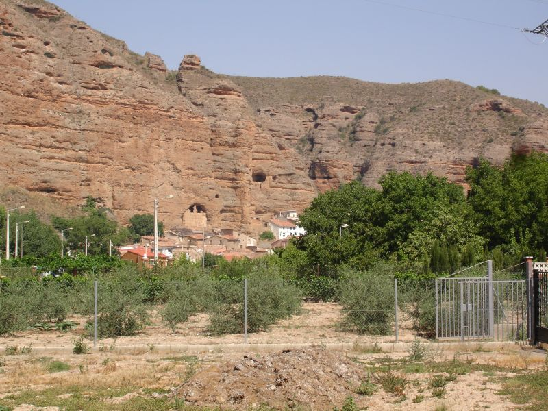 Vista de Los Fayos (Moncayo - Zaragoza).